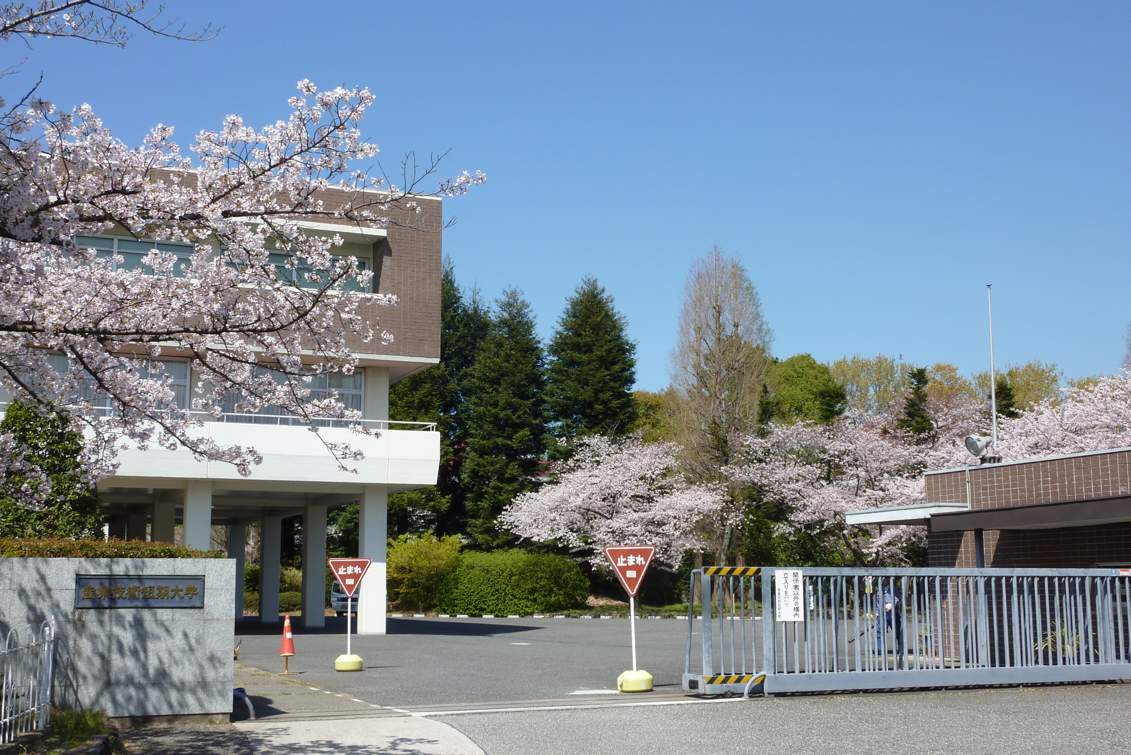 産業技術短期大学正門前